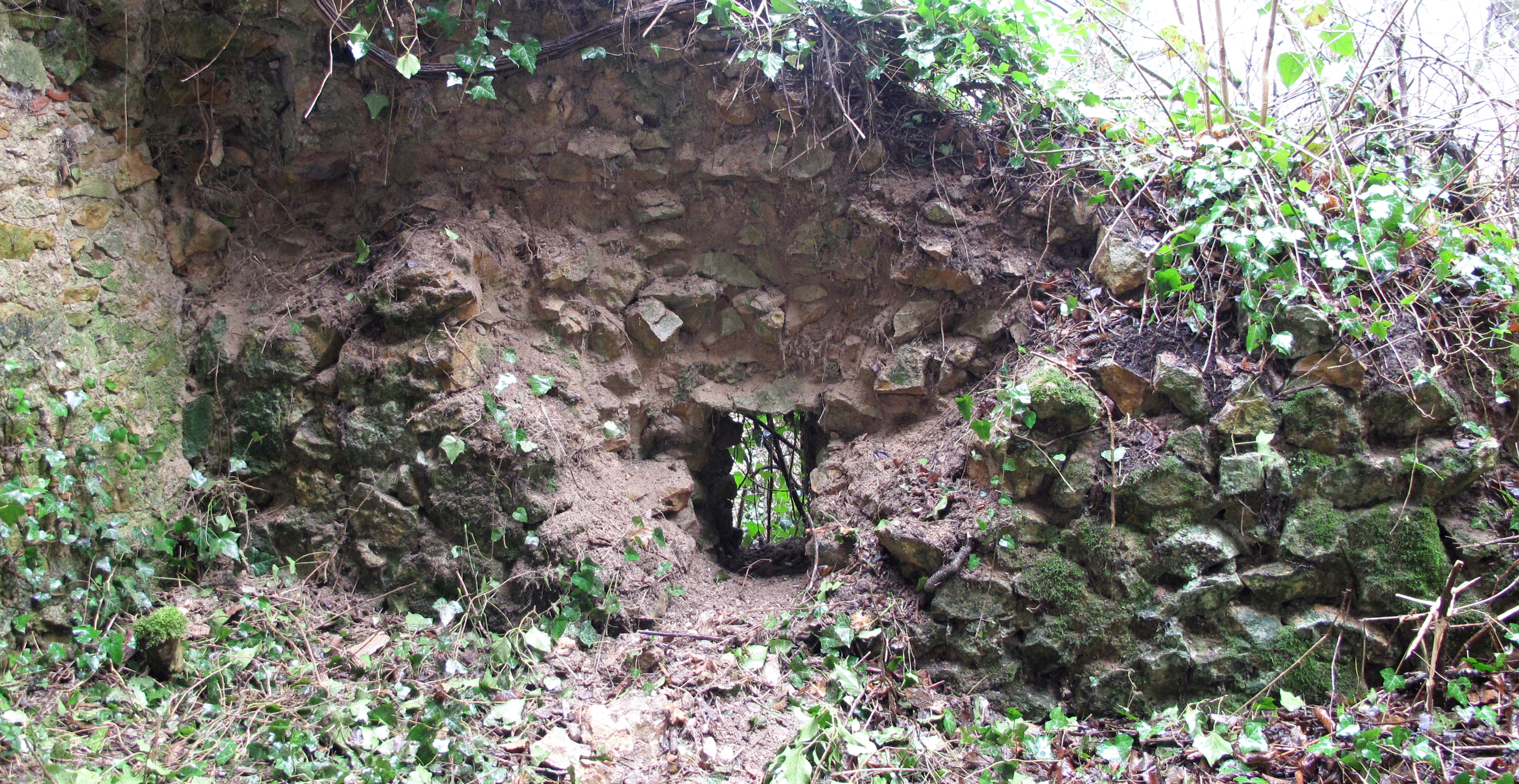 Maulschartenartige Öffnung in der südöstlichen Frontmauer. Von dem, nur wenige Meter südwestlich in der Längsfassade befindlichen gleichgestalteten Lichtschacht, oder "Kellerfenster" blieb nur der Sohlbereich, nach dem Jugendliche Ende der 1990er Jahre einen Teil der oberen Frontmauer zum Einsturz brachten. Im dritten Band des Breisgauer-Burgenprojektes (Artikel von Martin Strotz) wurde das noch Vorhandensein des hier abgebildeten "Lichtschachtes", vermutlich aufgrund des zeitweilig starken Pflanzenbewuchses, übersehen.